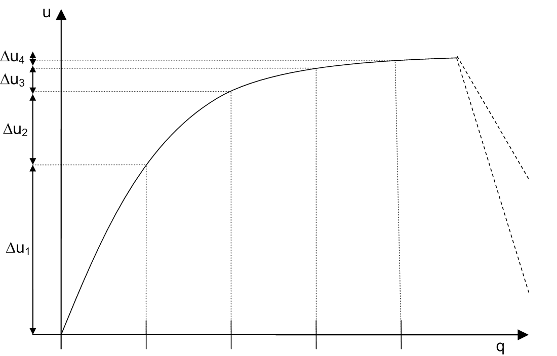 Erstes gossensches Gesetz: Abnehmender Grenznutzen beim Konsum weiterer Einheiten (u: Nutzen, q: Konsumierte Menge des betrachteten Gutes